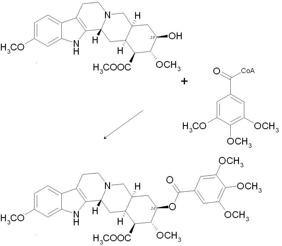 Letzter Schritt der Reserpin-Biosynthese: Veresterung von Reserpinsäuremethylester mit 3,4,5-Methoxybenzoyl-CoA.